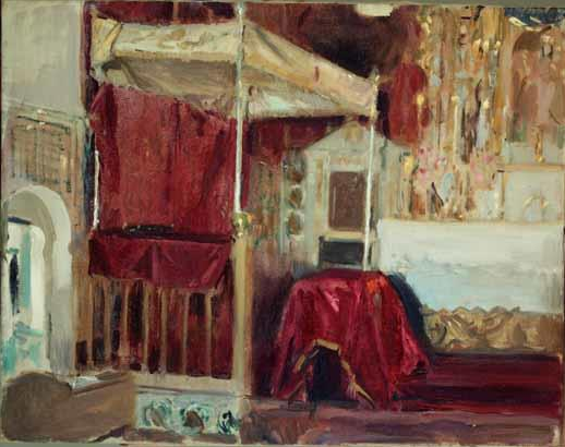 Capilla de la finca de Láchar, Granada (1917). Óleo sobre lienzo, 64 x 95 cm. Museo Sorolla, Madrid.